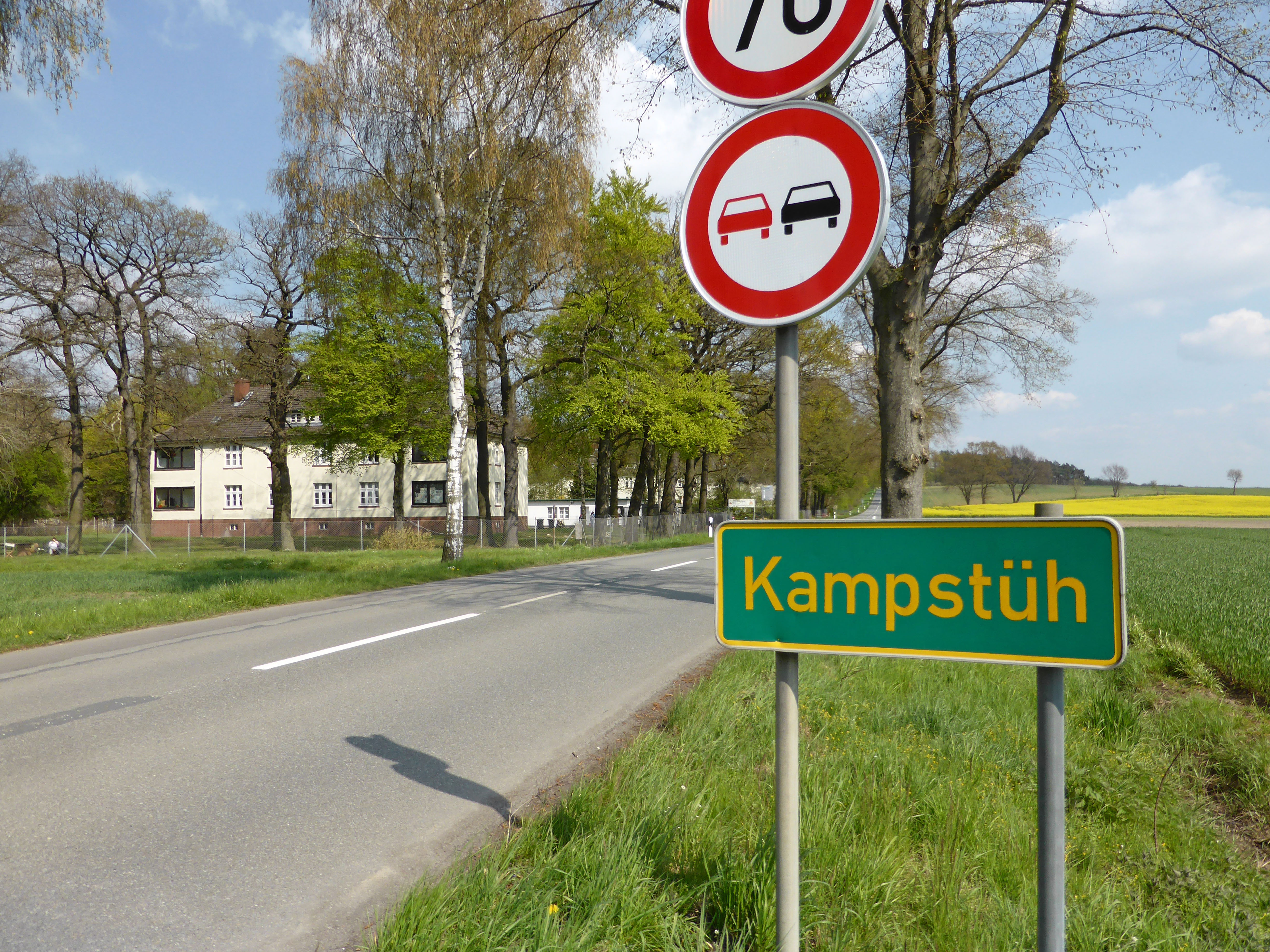 Ortshinweistafel Kampstüh (Landkreis Helmstedt)